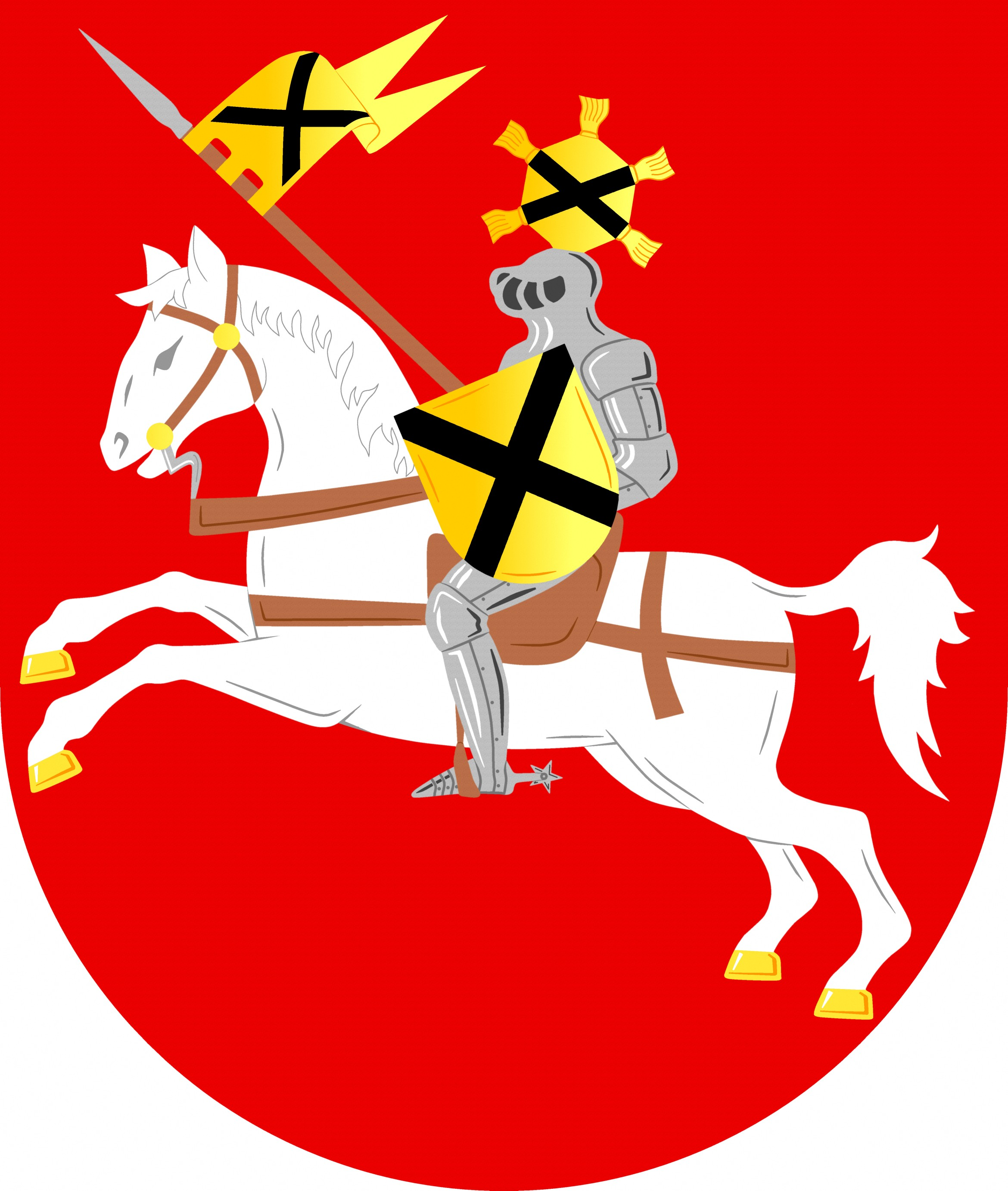 ZNAK MĚSTA KRÁSNÉ ÚDOLÍ, KARLOVARSKÝ KRAJ